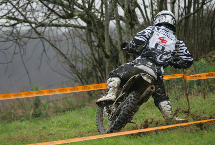 Manu Albepart le samedi dans une spéciale de Grappe de Cyrano 2010